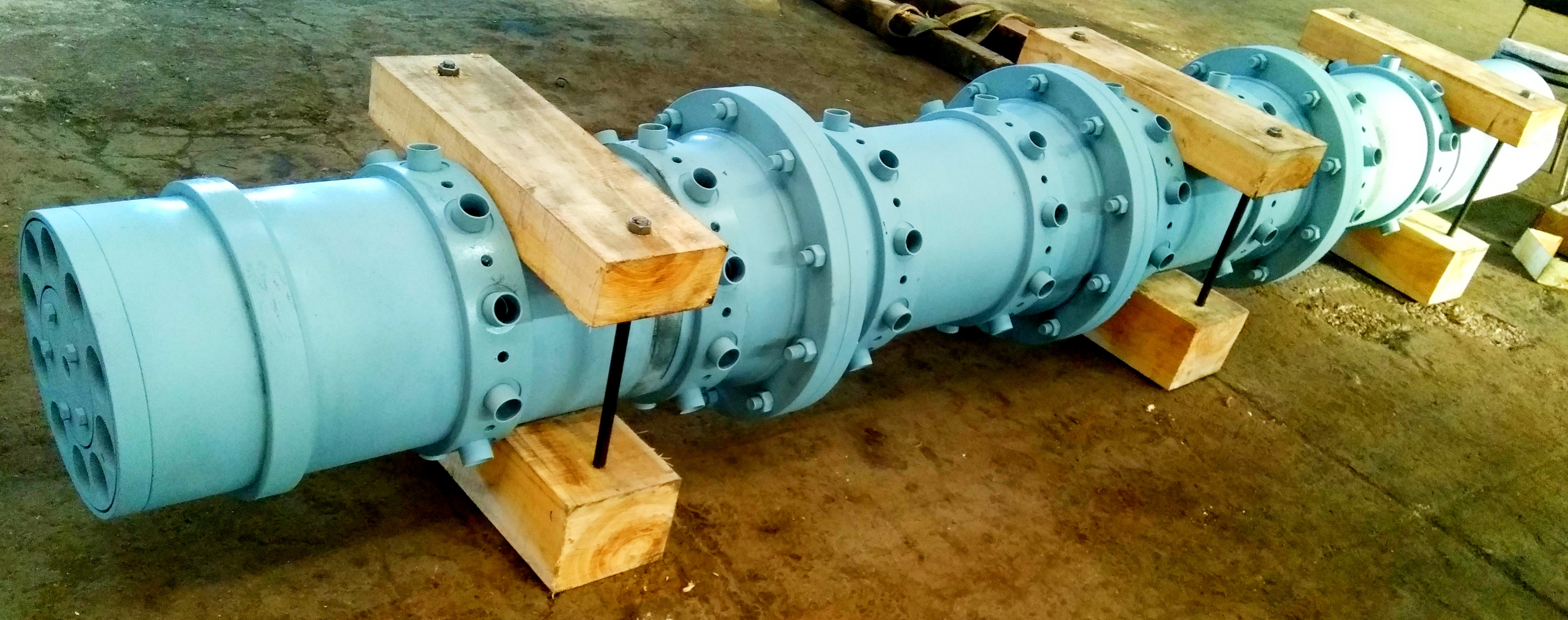 Вал ячейковый